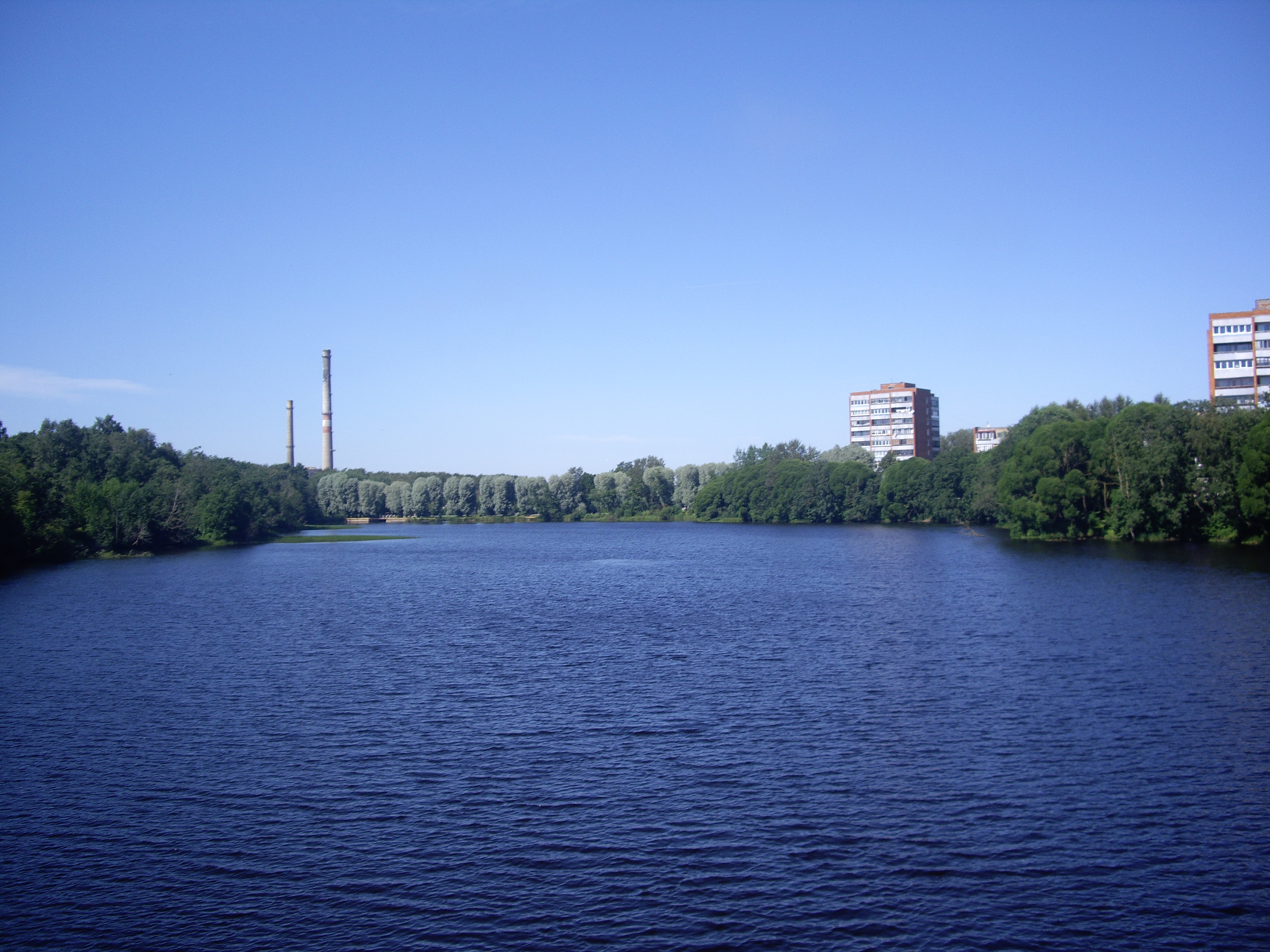 Sõtke jõgi Sillamäel